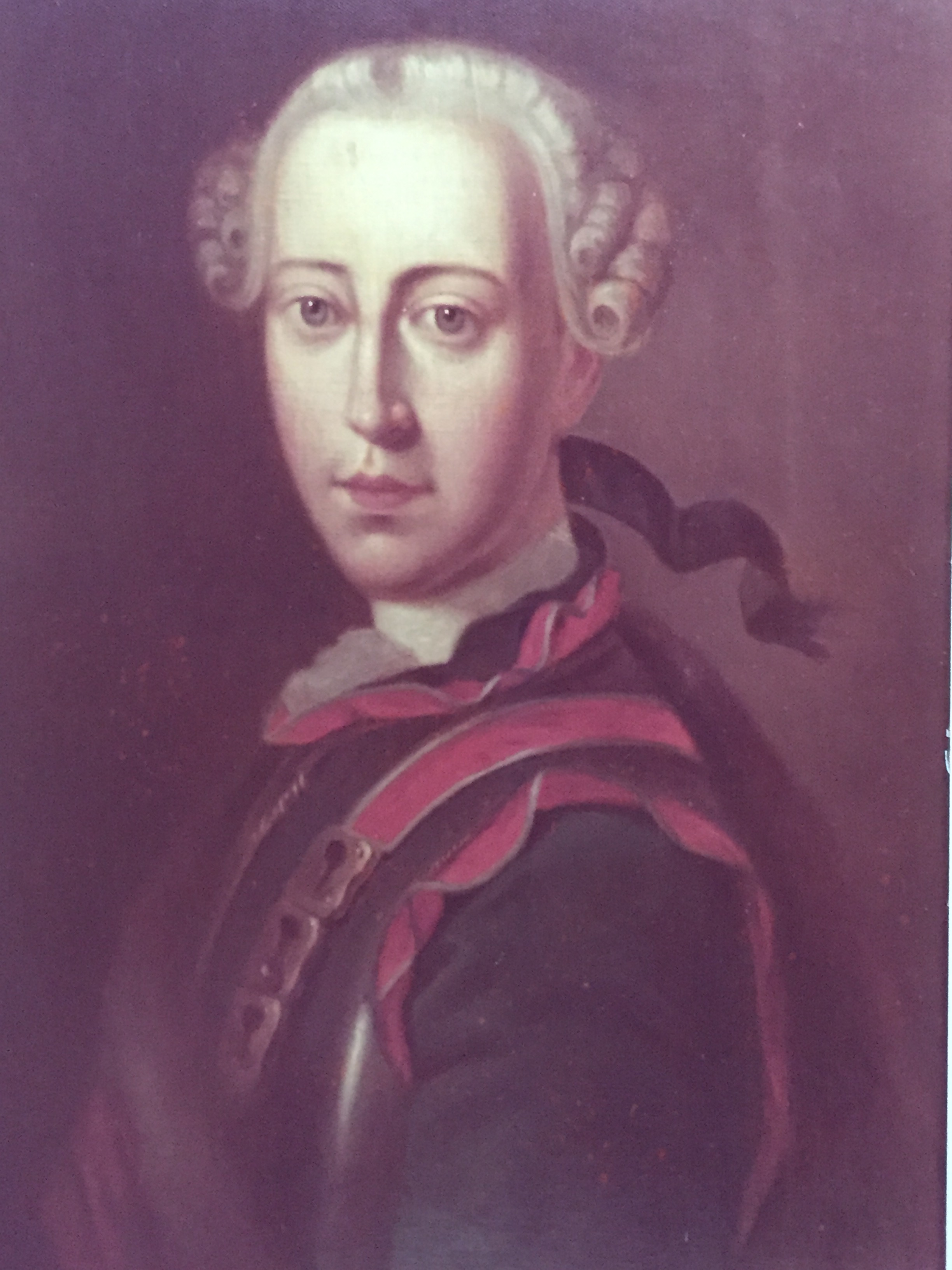 Heinrich Gottfried Graf von Mattuschka, Besitzer von Pitschen; Künstler und Herstellungsjahr unbekannt